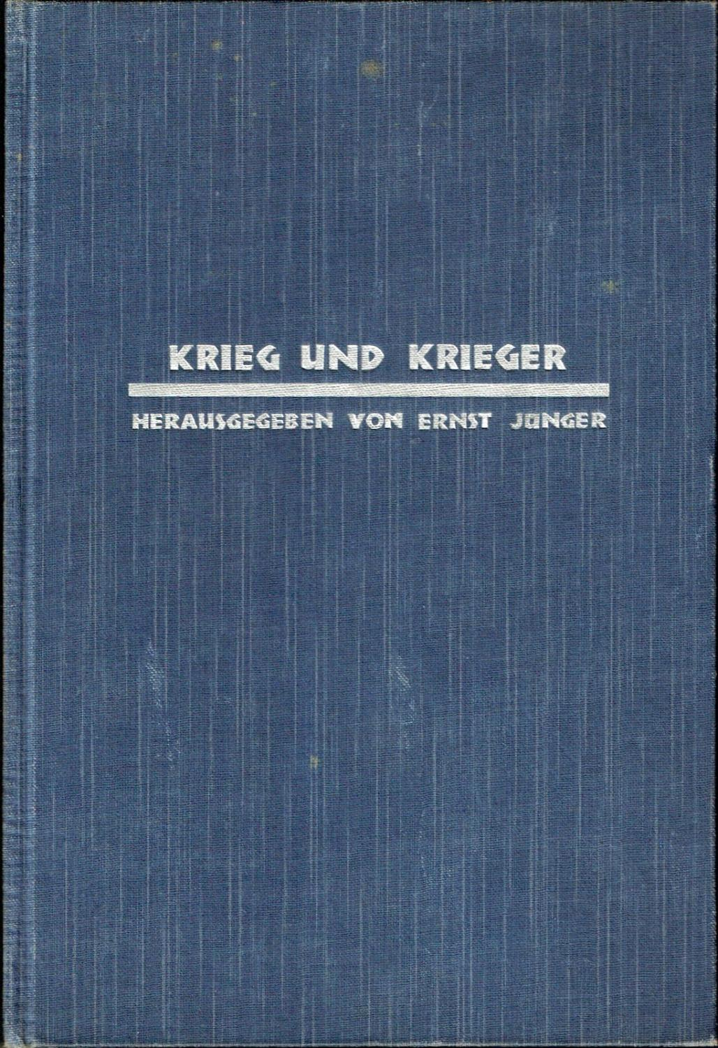 Ernst Jünger (Hrsg.): Krieg und Krieger, Berlin, Junker und Dünnhaupt, 1930. Erste Ausgabe. Mit dem Text von Ernst Jünger: Die totale Mobilmachung